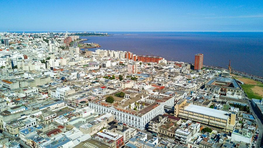 Монтевидео, старый город